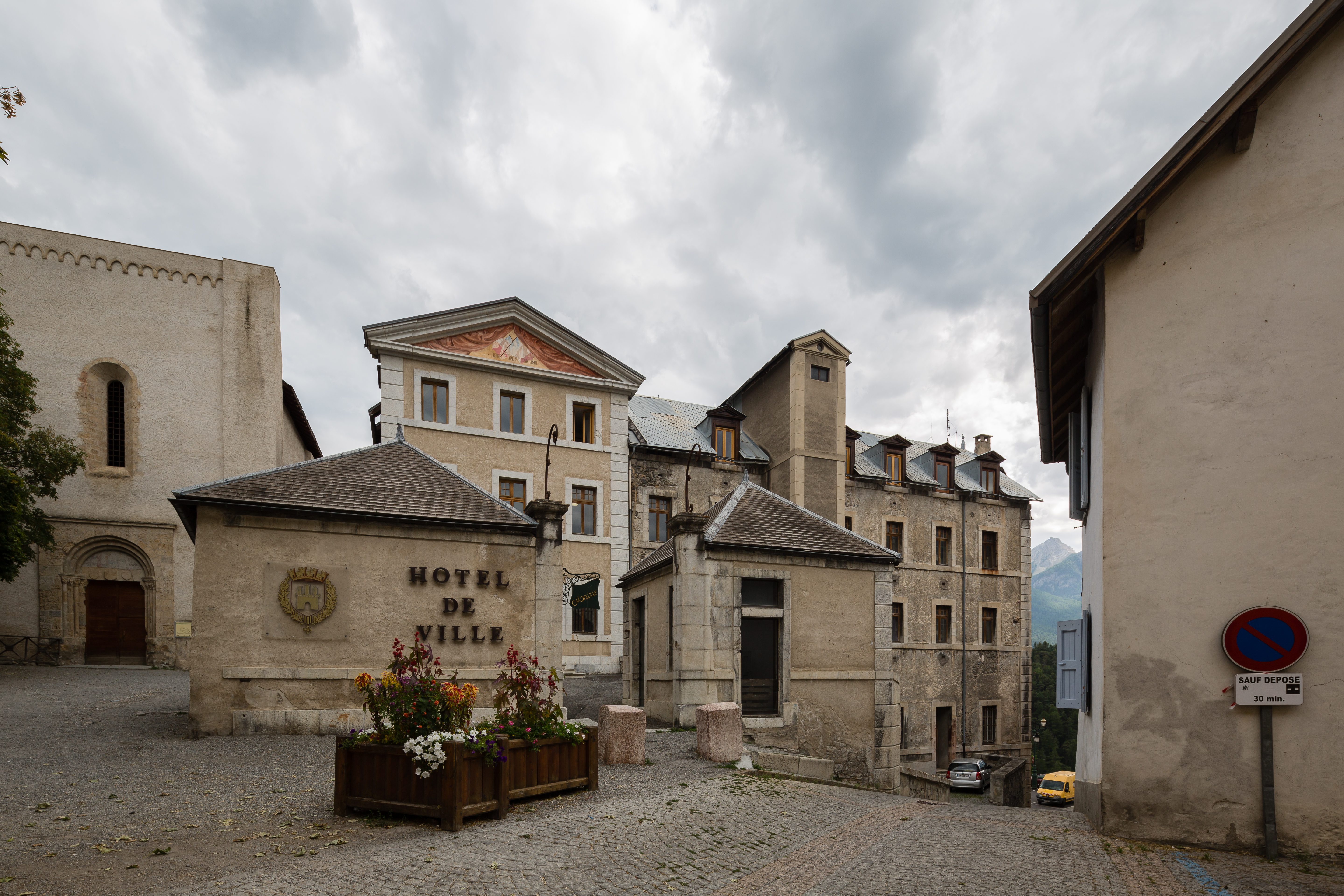 La mairie de Briançon (France).